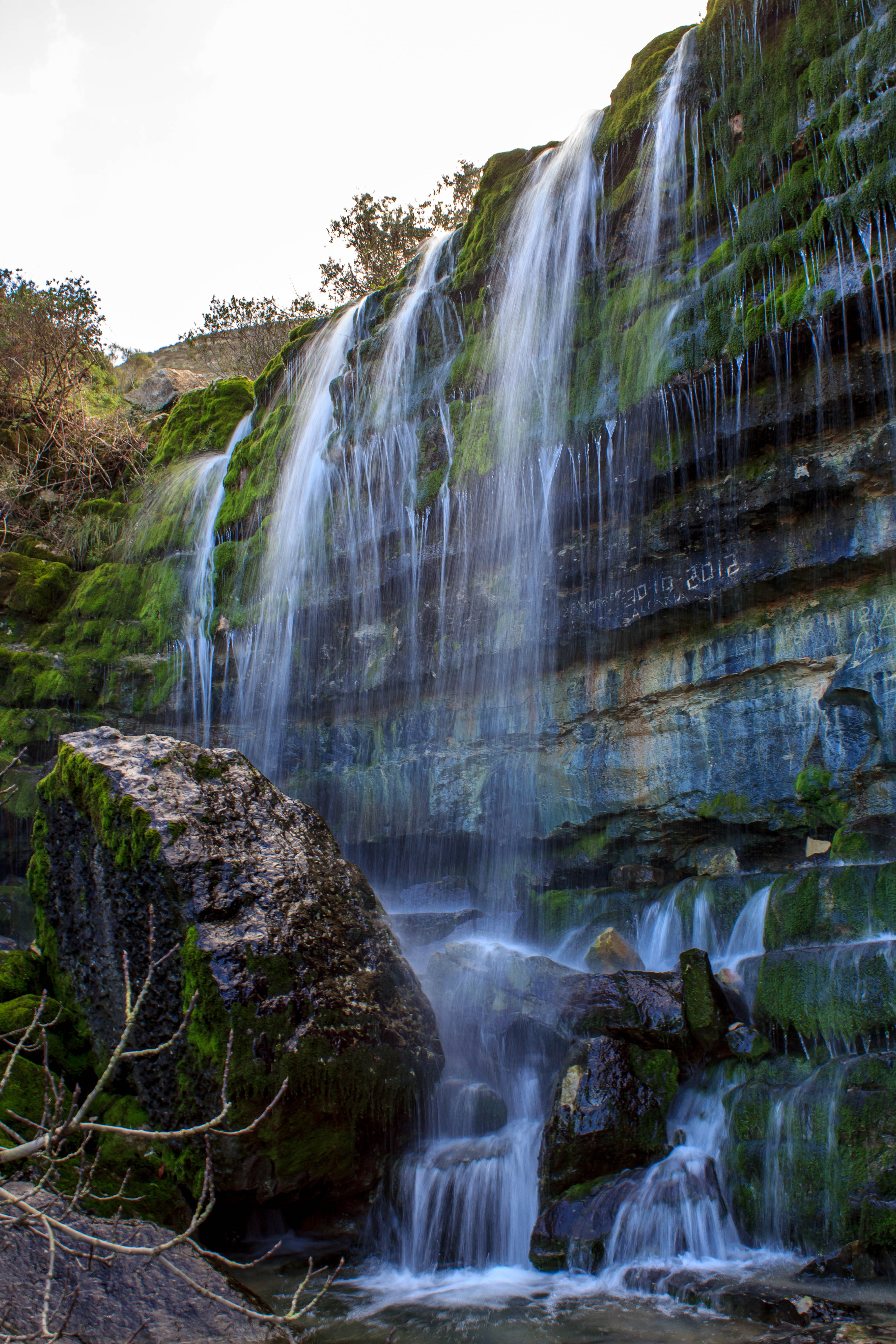 Serras d'Aire e Candeeiros This is a photography of a protected area of Portugal indexed in the World Database on Protected Areas with the ID: 555531085 (WDPA)